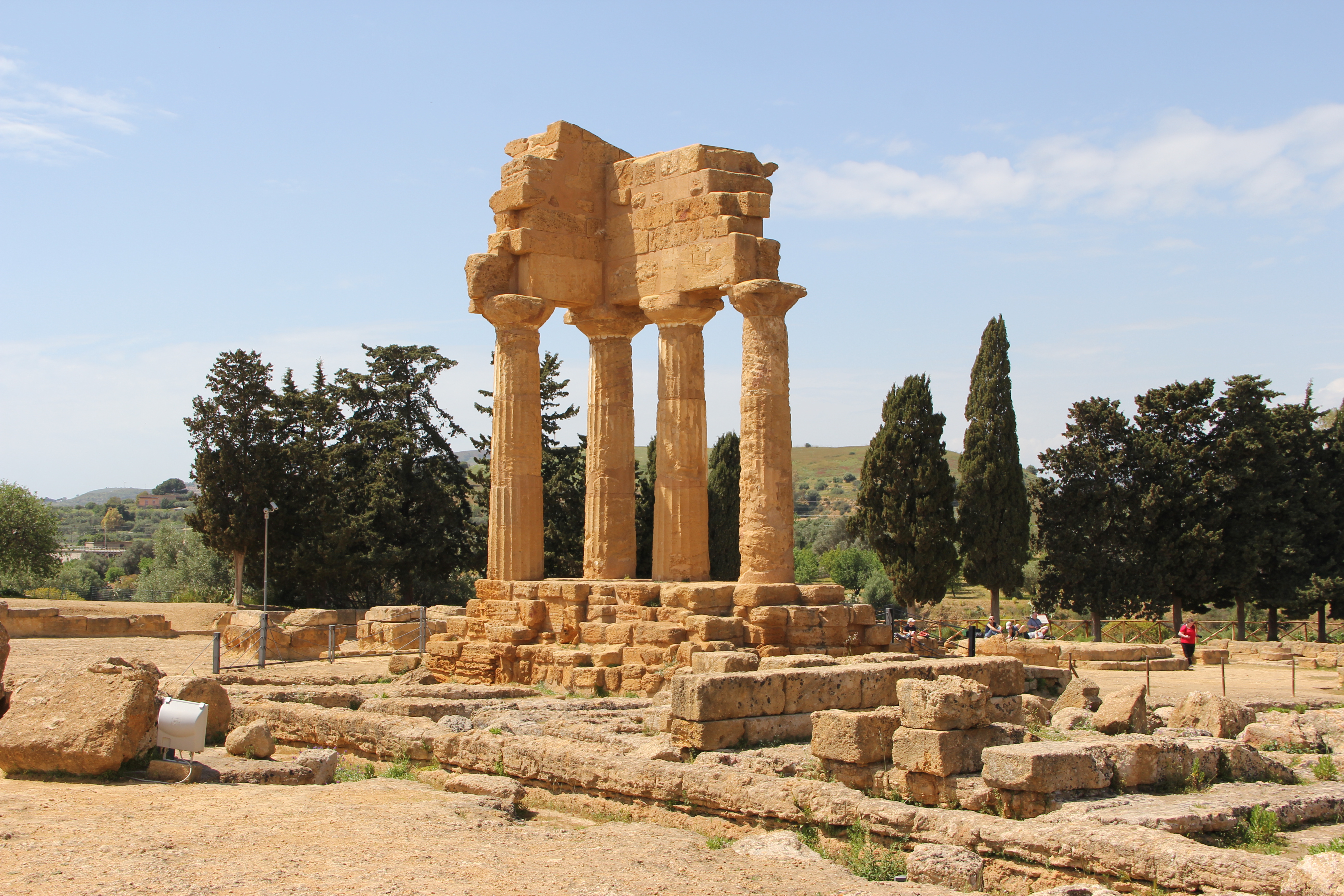 Temple des Dioscures. Vallée des temples. Agrigente.